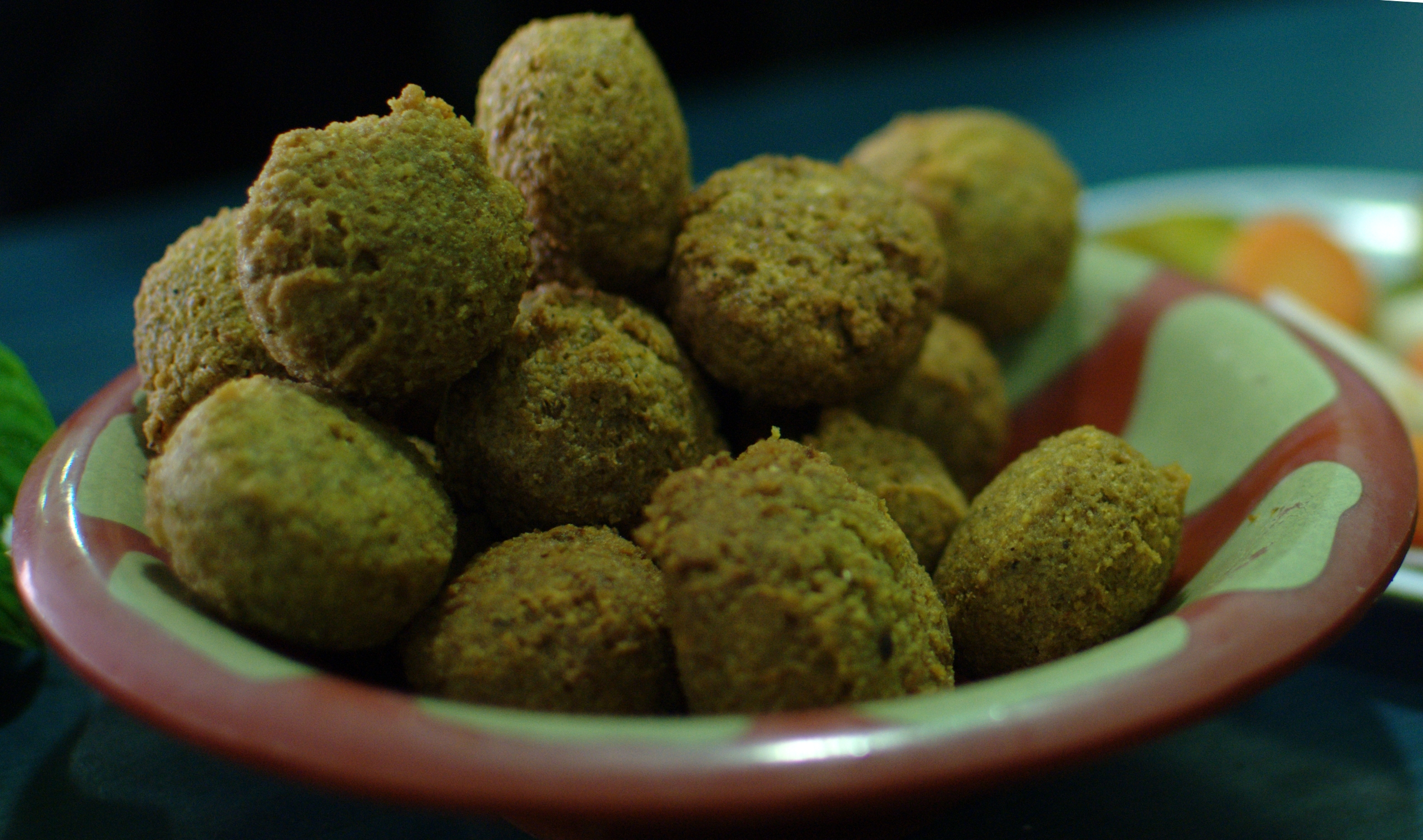 Falafel from Jordan